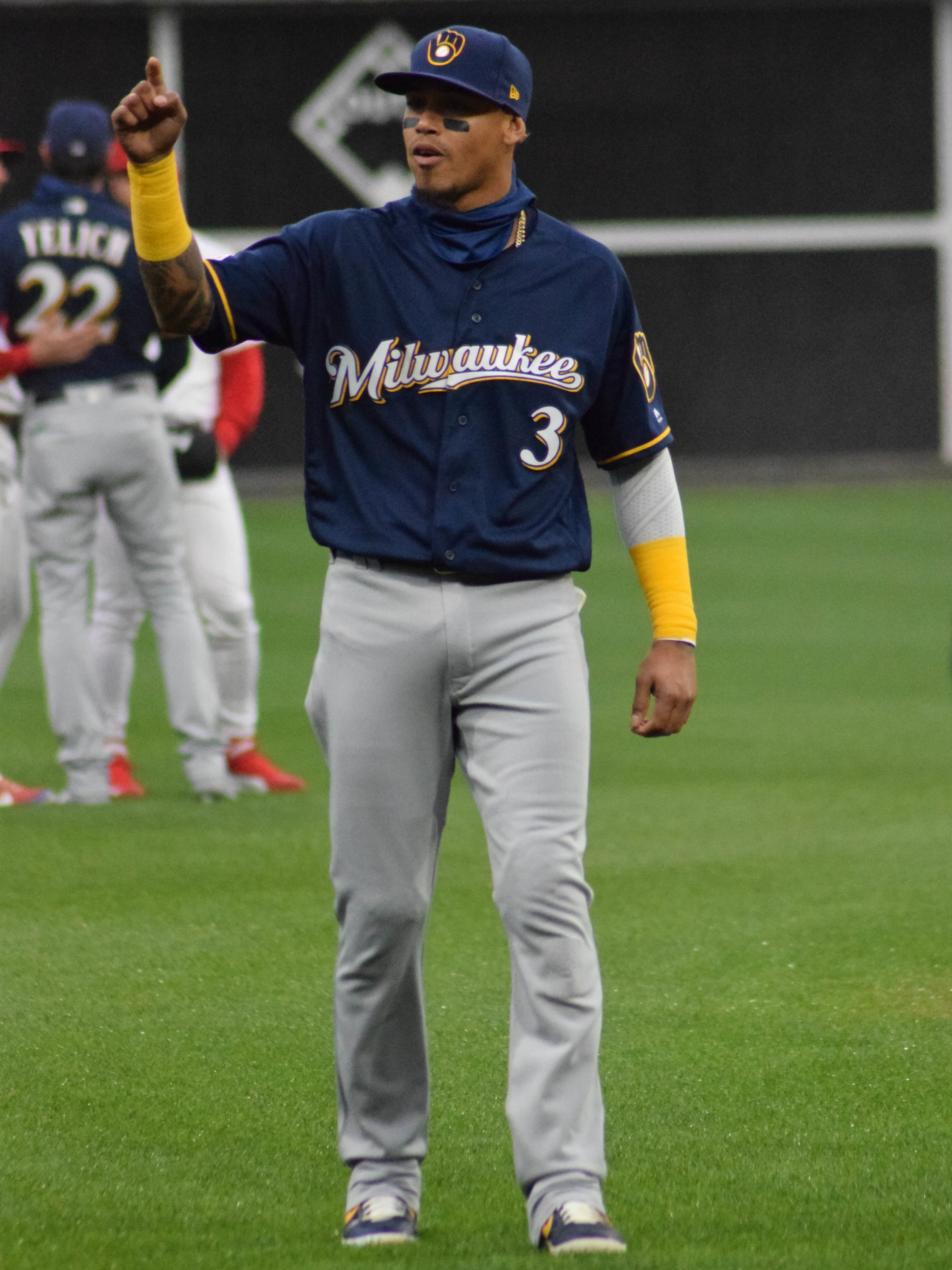 Orlando Arcia